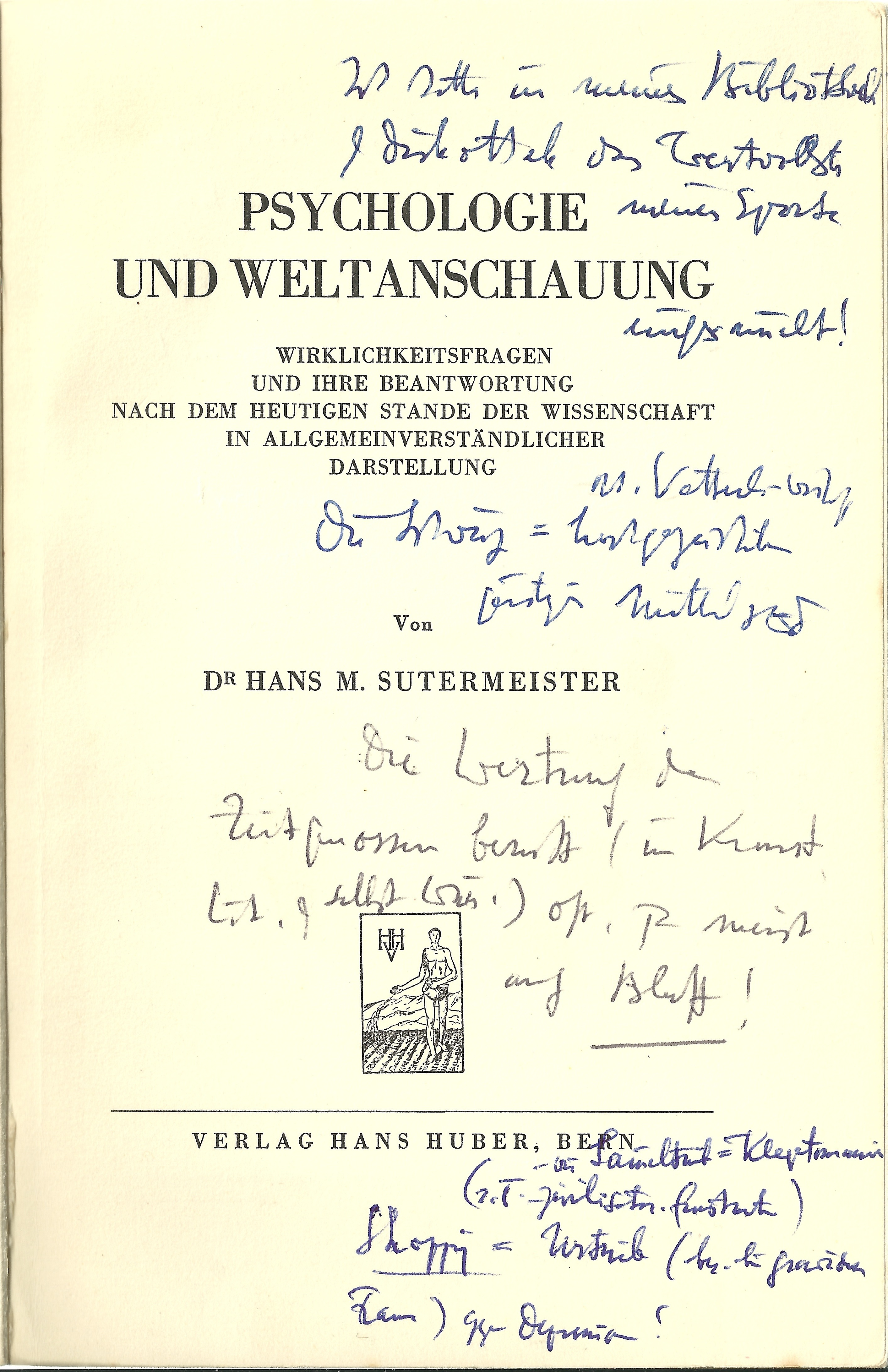 Titelblatt eines Handexemplars von Hans Martin Sutermeisters Psychologie und Weltanschauung (1944)